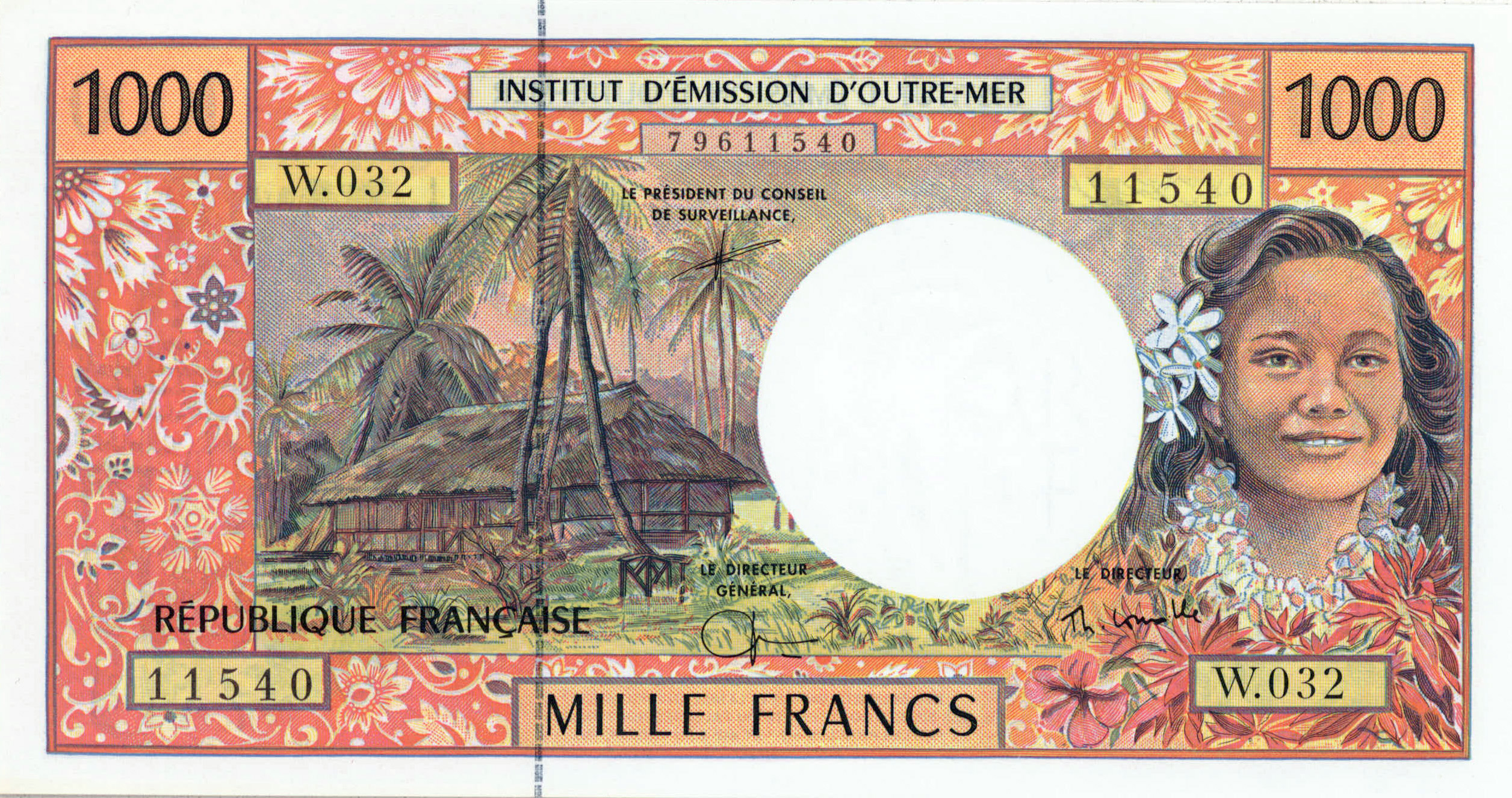 billet de banque